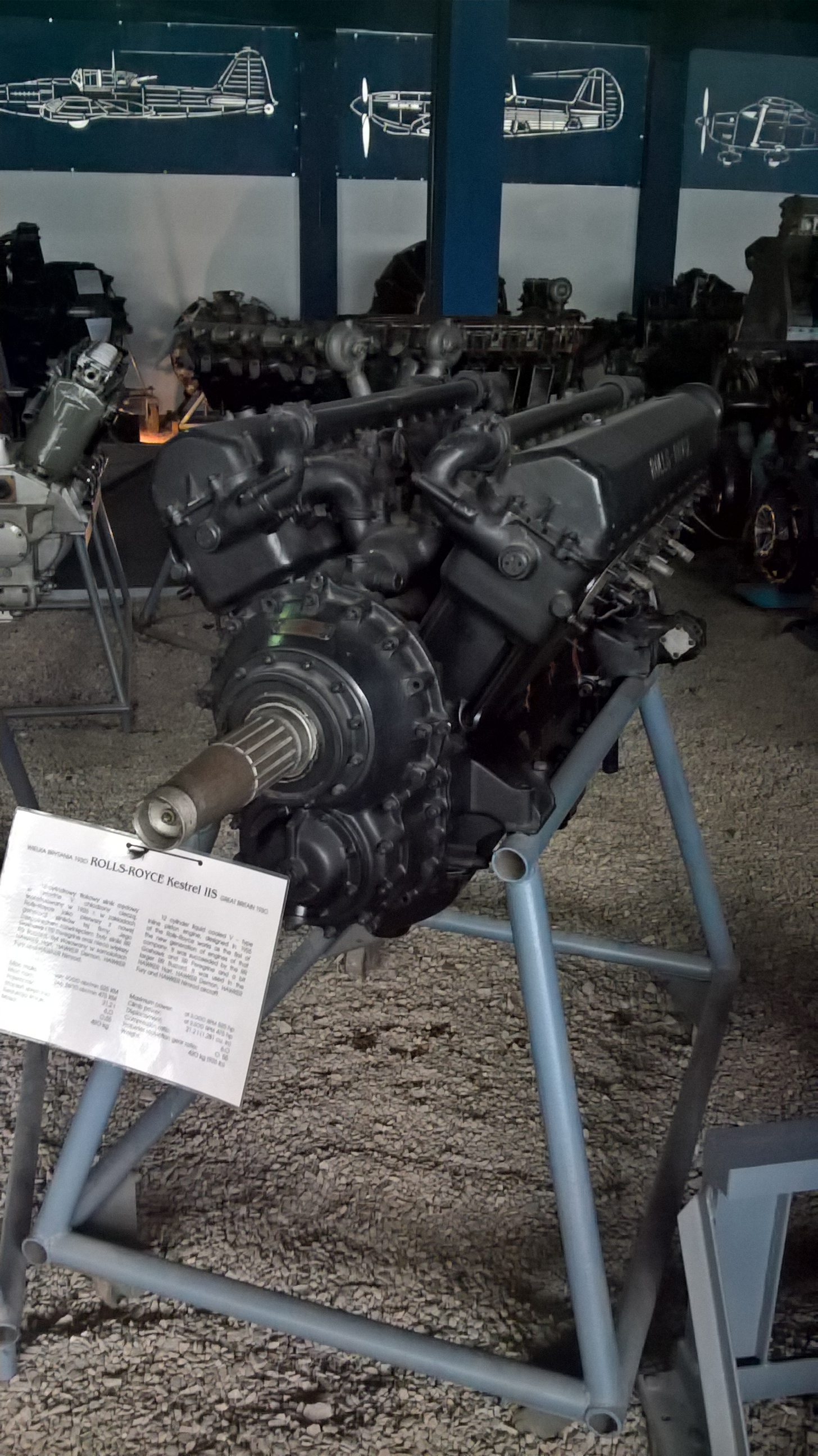 Brytyjski 12-cylindrowy silnik widlasty Rolls-Royce Kestrel IIS z 1930 r. ze zbiorów Muzeum Lotnictwa Polskiego w Krakowie.